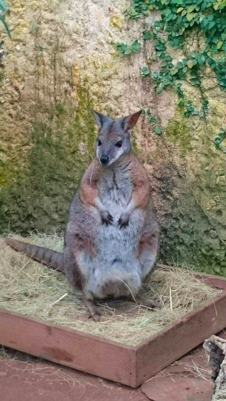 Canguro del Mariposario de Benalmádena